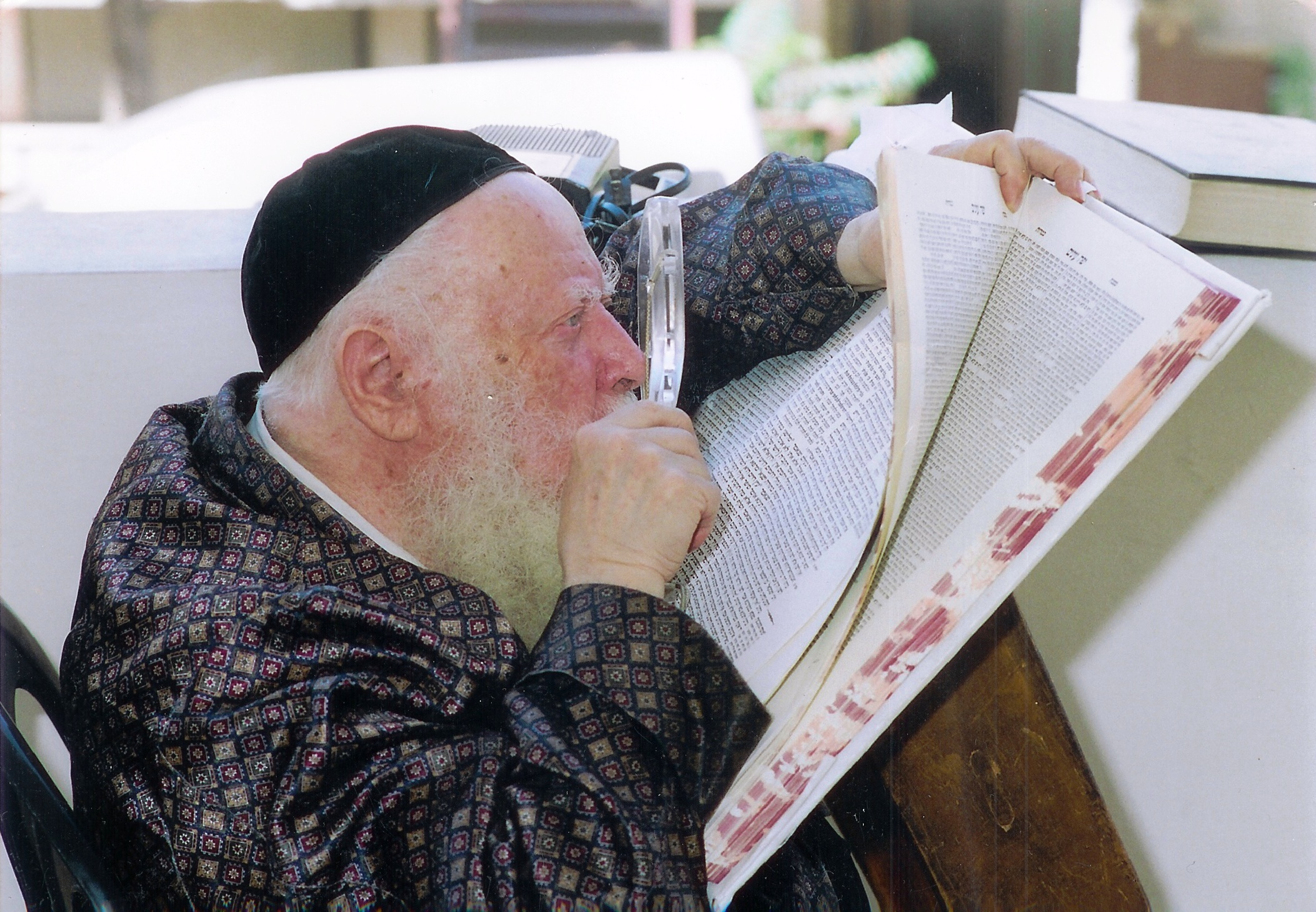 הרב לומד